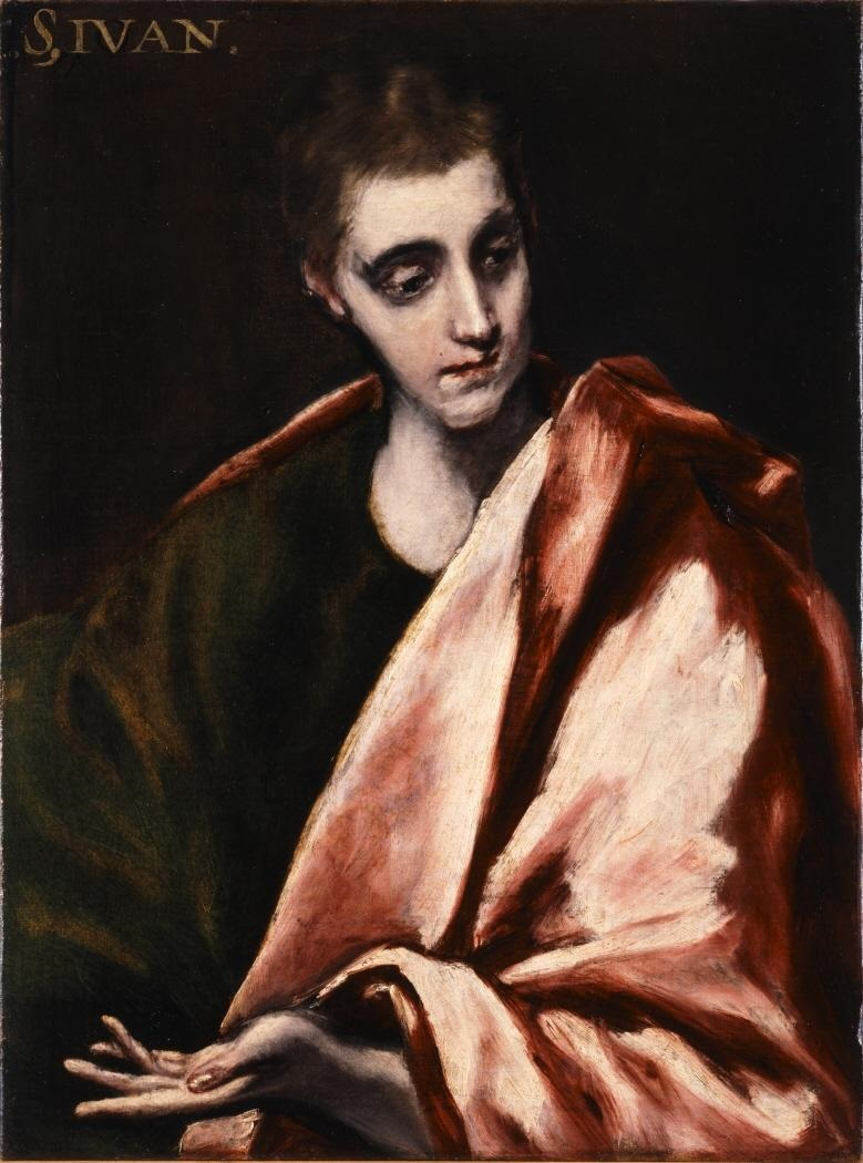 La obra representa a San Juan Evangelista, uno de los doce Apóstoles.